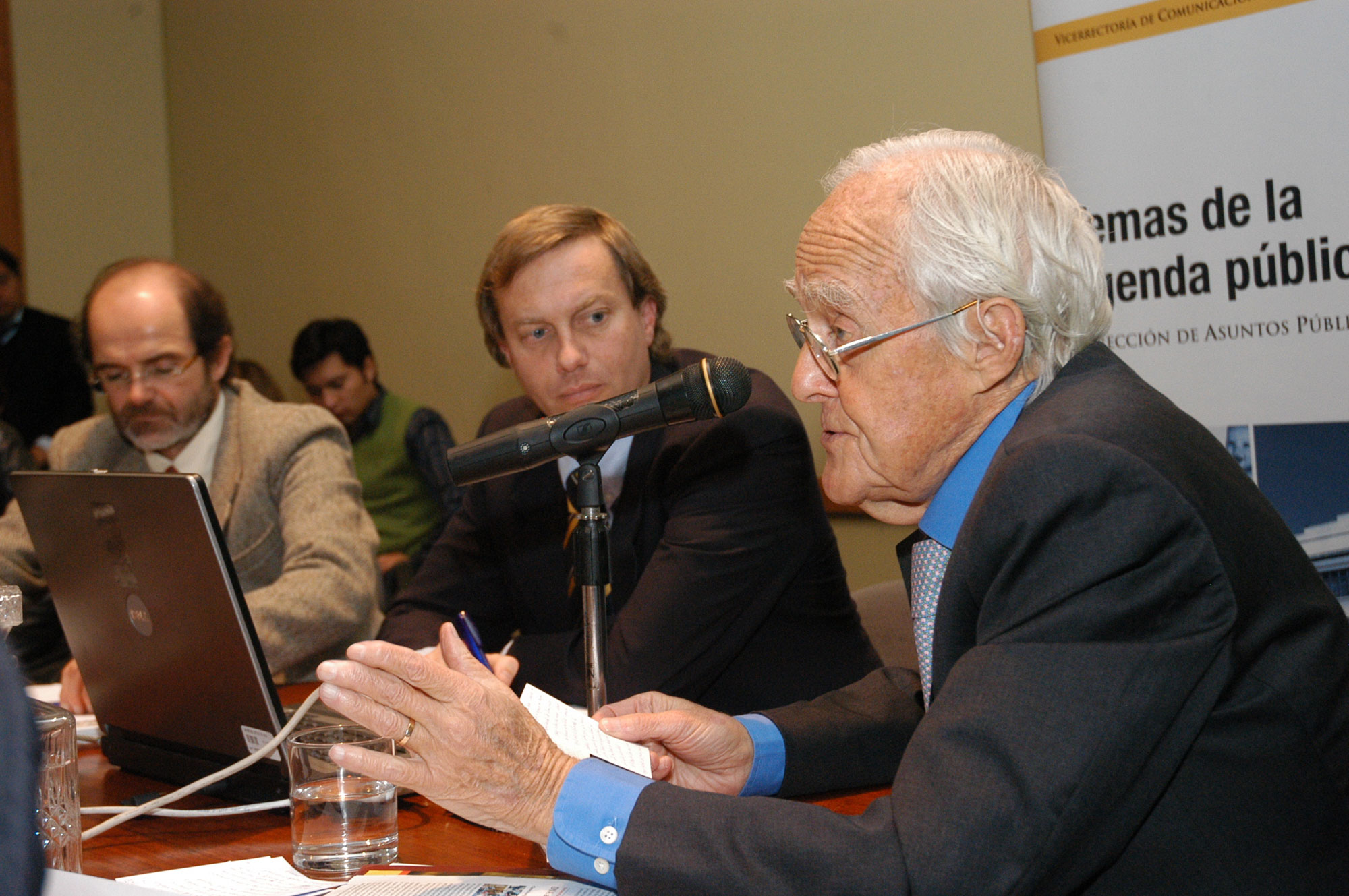 Edgardo Boeningner en una expoición sobre elecciones en la Pontificia Universidad Católica de Chile. Al fondo, el diputado José Antonio Kast.